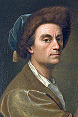 Self-portrait